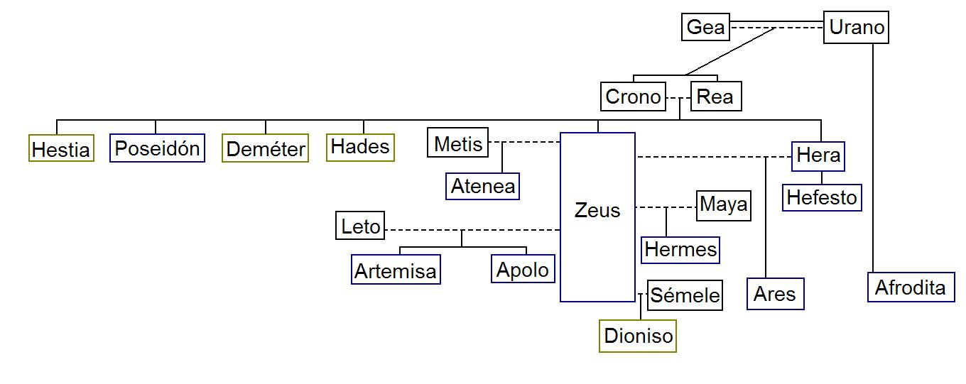 Árbol genealógico de los dioses olímpicos.